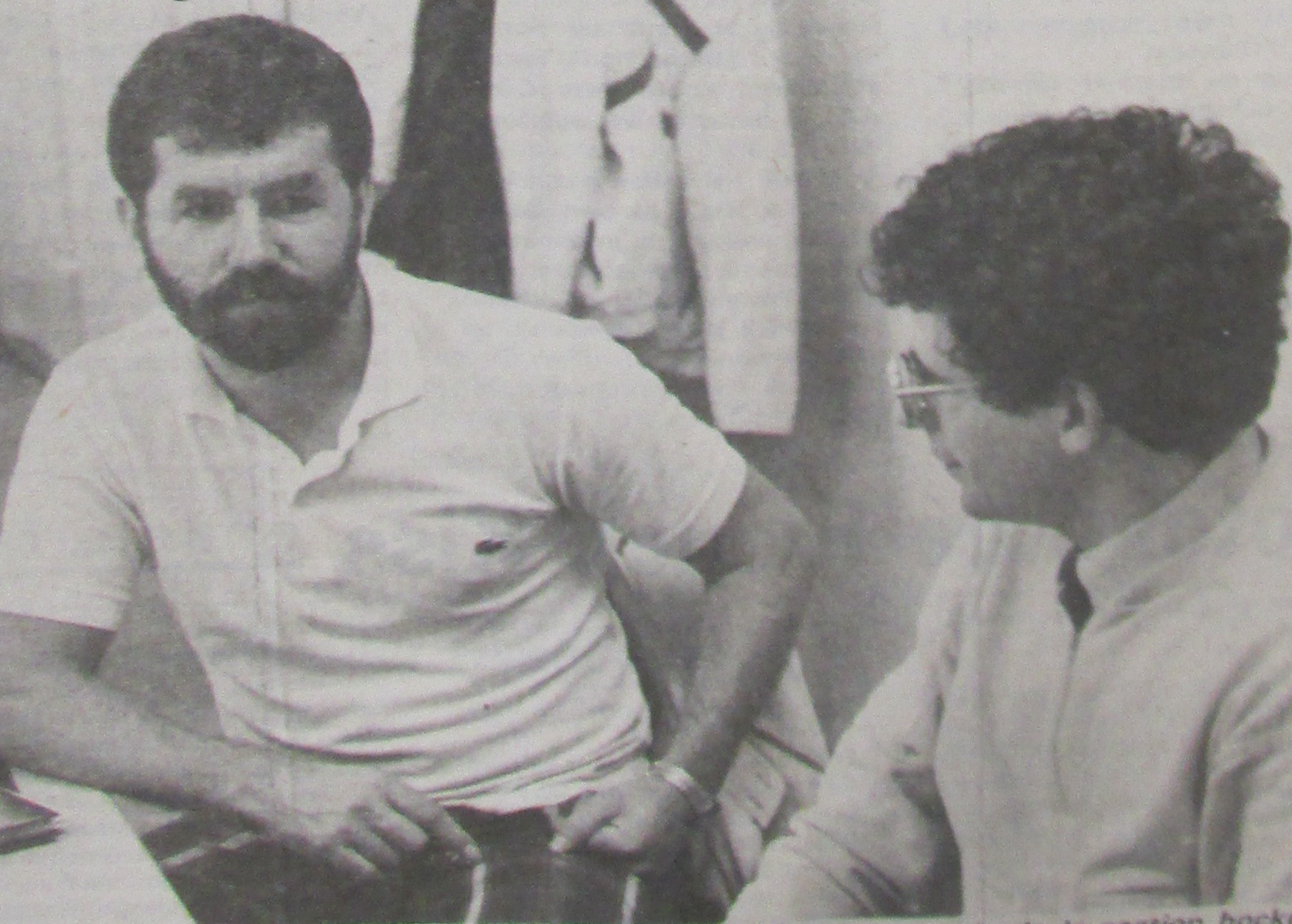 Le joueur de hockey international hongrois Andreas Farkas en compagnie de Ghislain Mérenne, président du club de hockey d'Épinal en 1986.